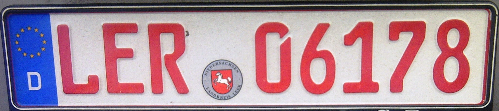 Handelaarskenteken Kreis Leer Niedersachsen Duitsland